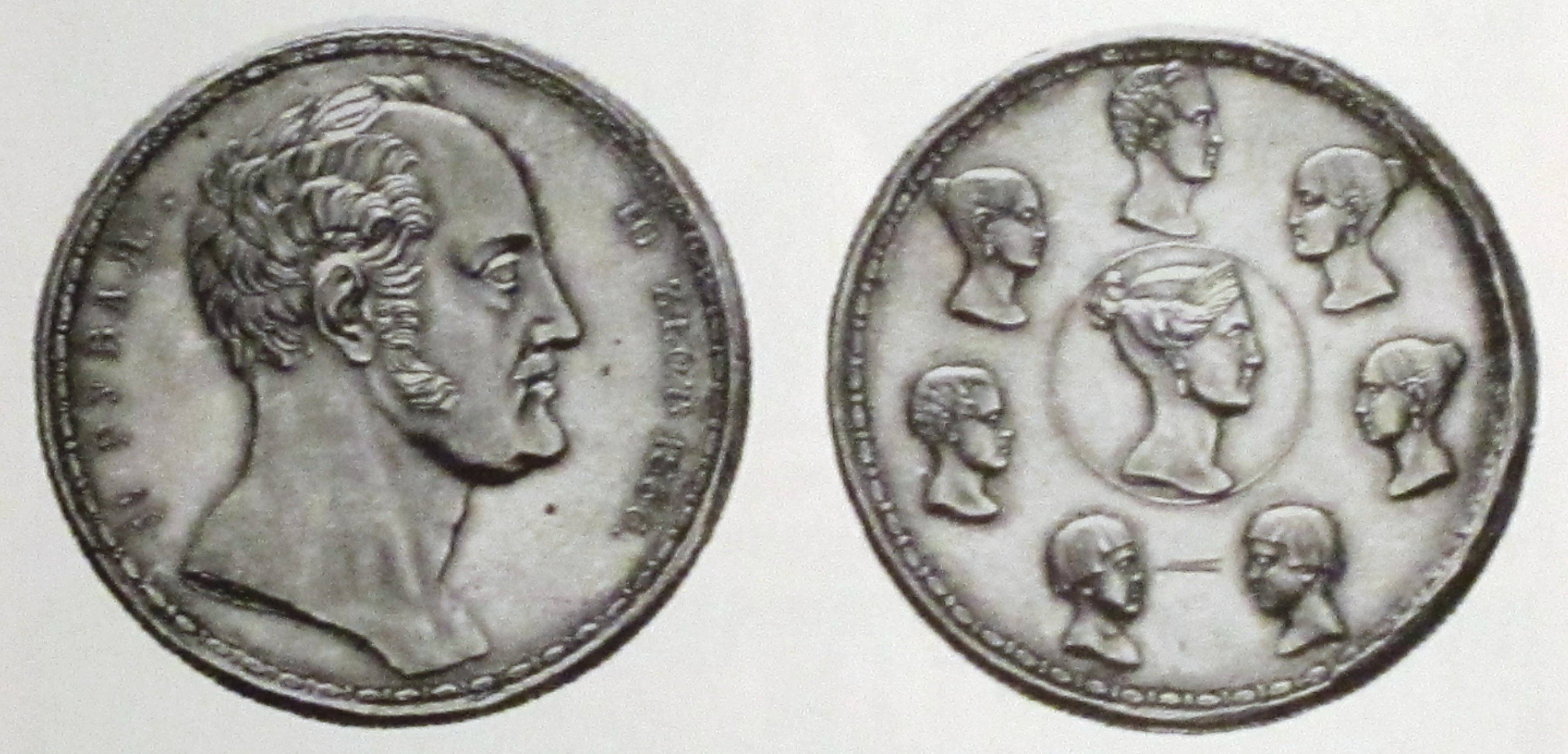 Familienrubel Nikolaus I. (1825-1855), 1 ½ Rubel (1836)